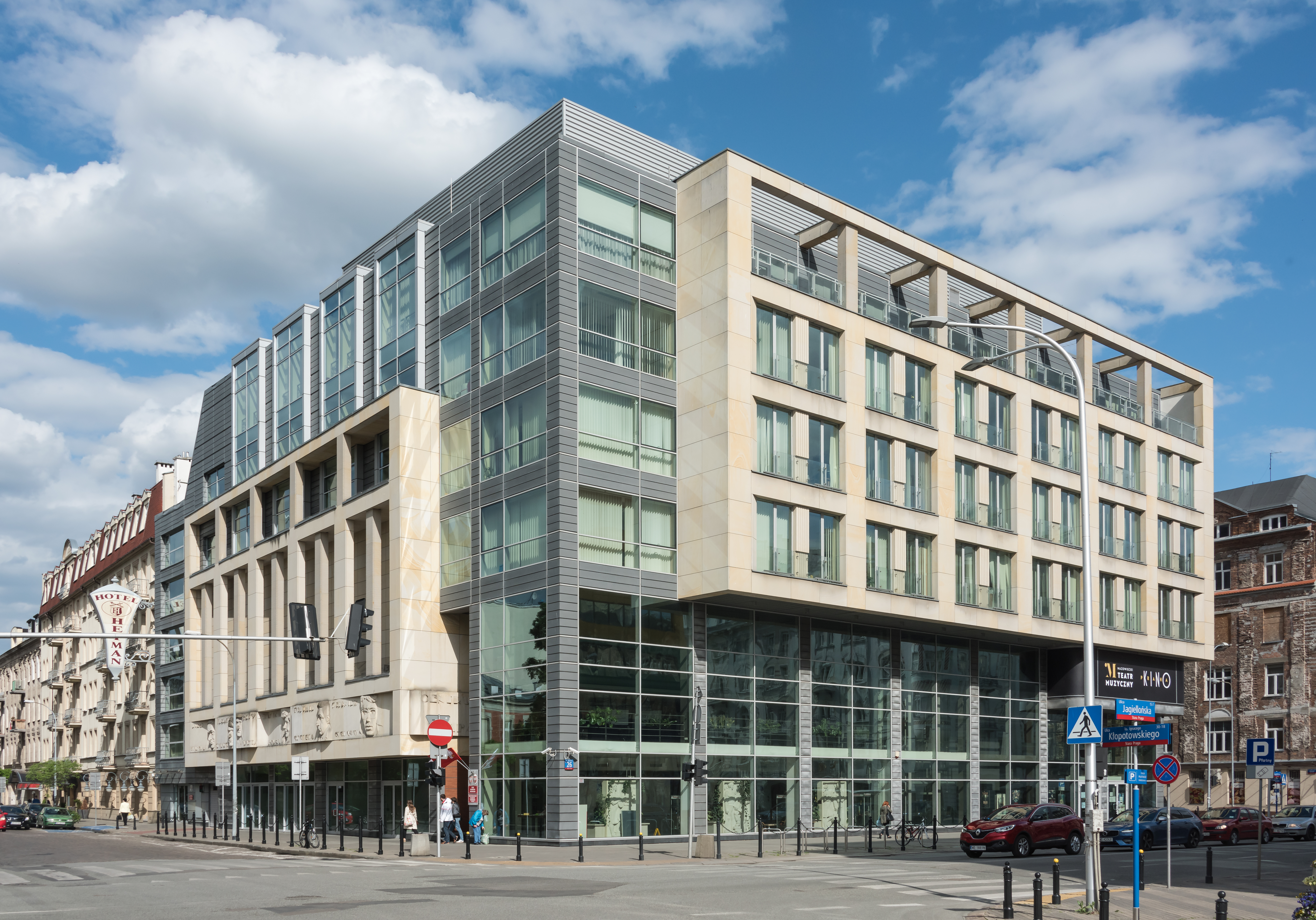 Centrum Praha przy ul. Jagiellońskiej 26 w Warszawie, siedziba m.in. Mazowieckiego Teatru Muzycznego